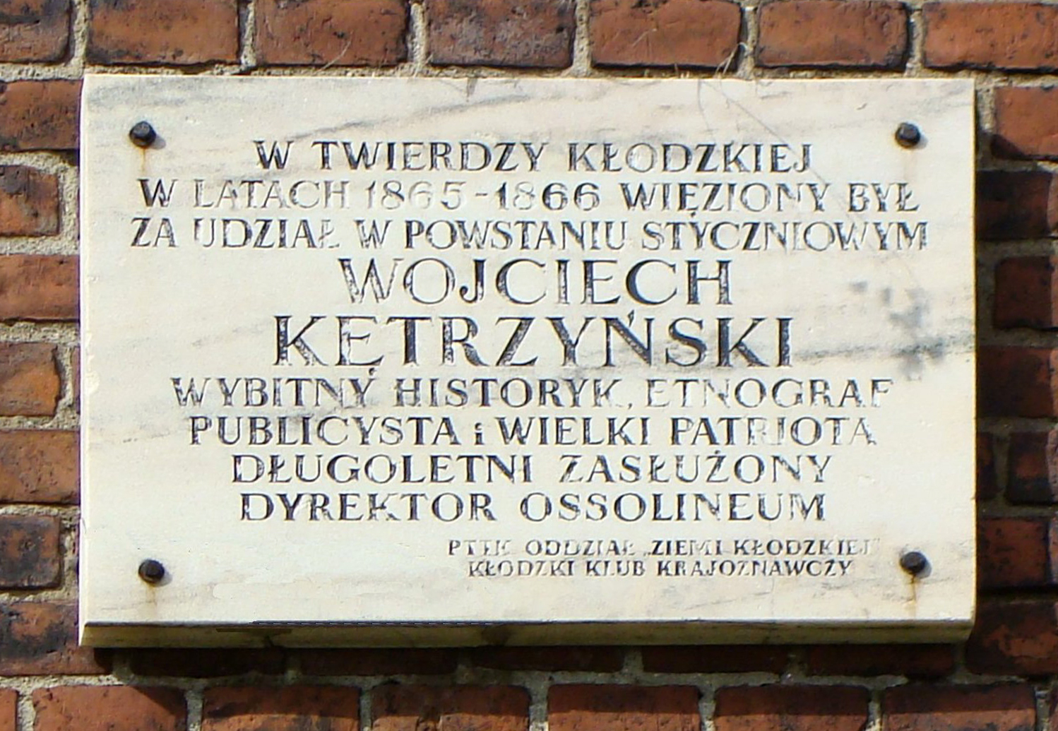 Wojciech Kętrzyński - tablica upamiętniająca jego pobyt w pruskim więzieniu w Twierdzy Kłodzkiej